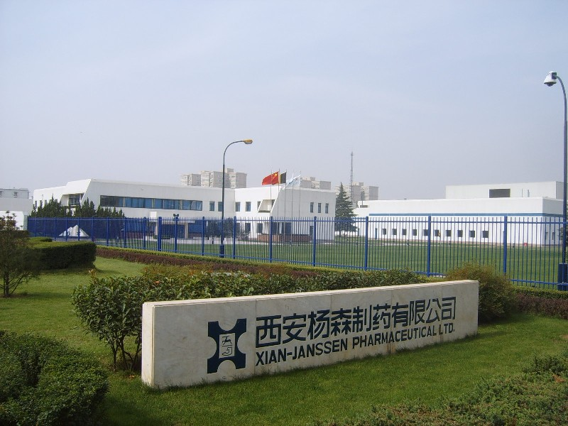 西安杨森制药有限公司 / Janssen Pharmaceutica unit in Xi'an